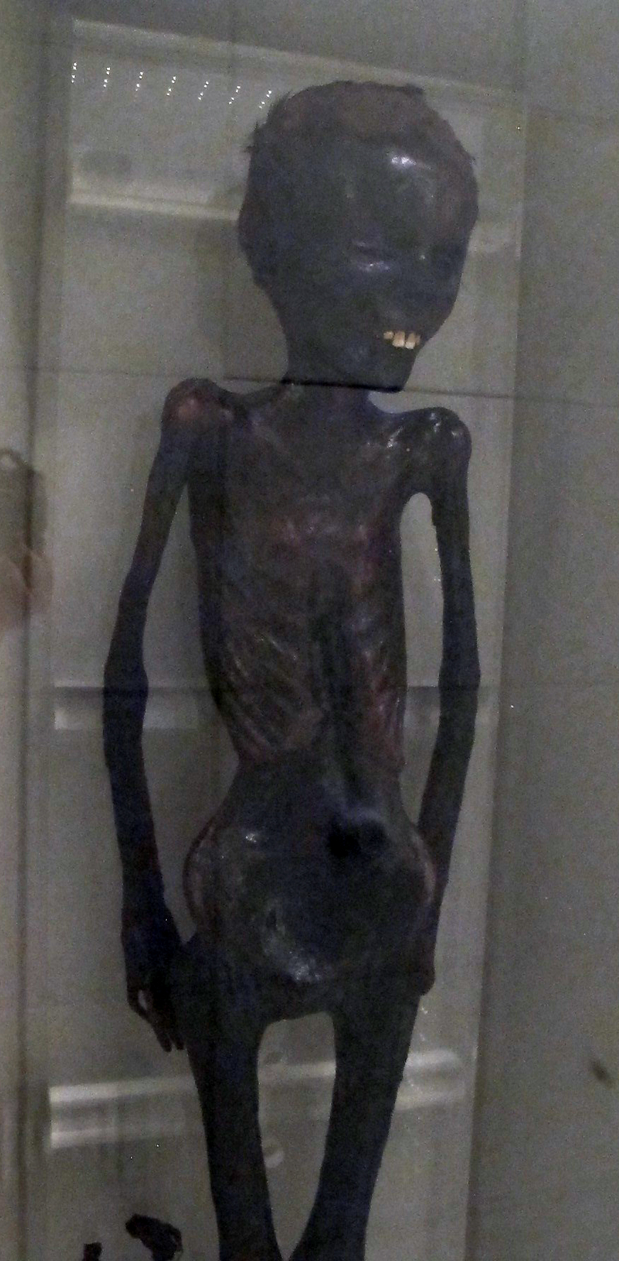 Palazzo Massimo alle Terme (Roma)